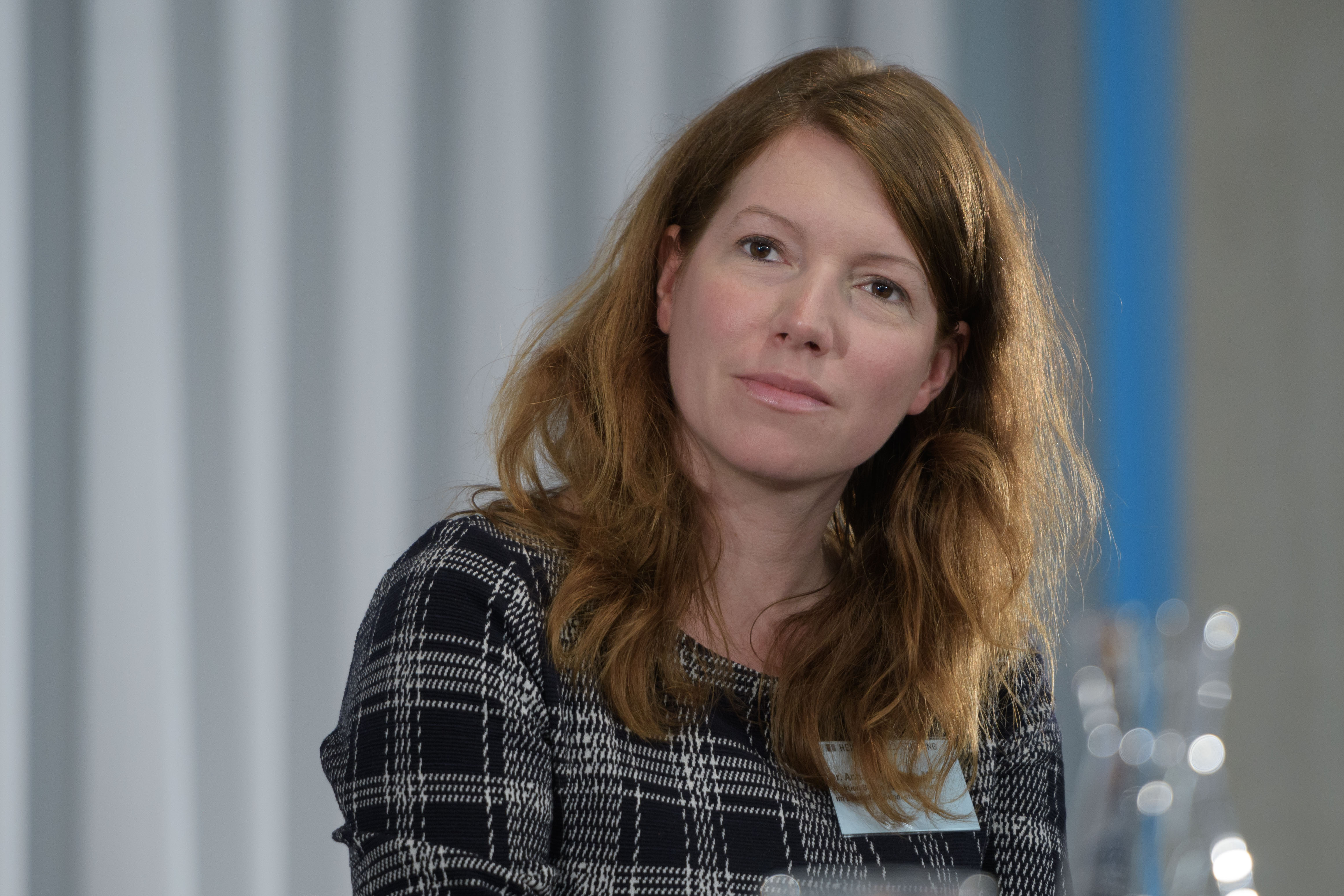 Heinrich-Böll-Stiftung: Baustelle Bildung – Befähigung für die digitale Zukunft - #digiZuk, Dr. Anna Christmann (MdB, Fraktion B90/Die Grünen) Foto: stephan-roehl.de